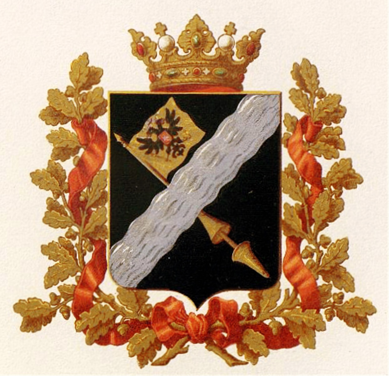 Official Russian Empire coat of arms Terek Oblast. Герб Российской Империи Терской области в Гербовнике МВД. Утверждён Императором Всероссийским Александром Вторым в 1873 году.